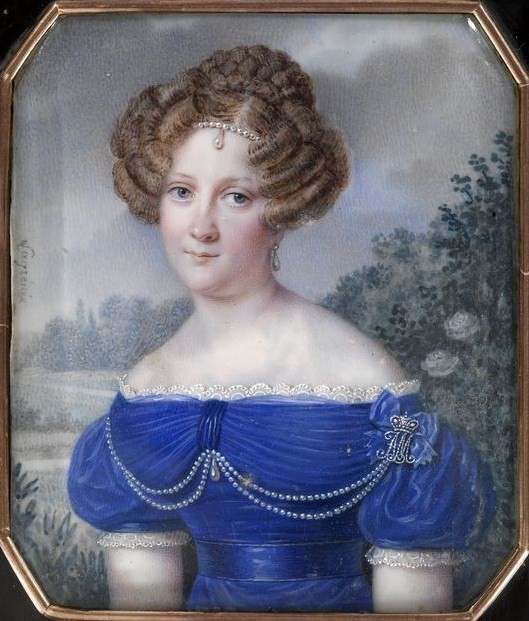 Портрет фрейлины императриц Александры Федоровны и Марии Федоровны. Портрет княжны Софьи Сергеевны Хованской (1810-1867), с 1827 года фрейлина, с 1829 года жена С. А. Кокошкина.